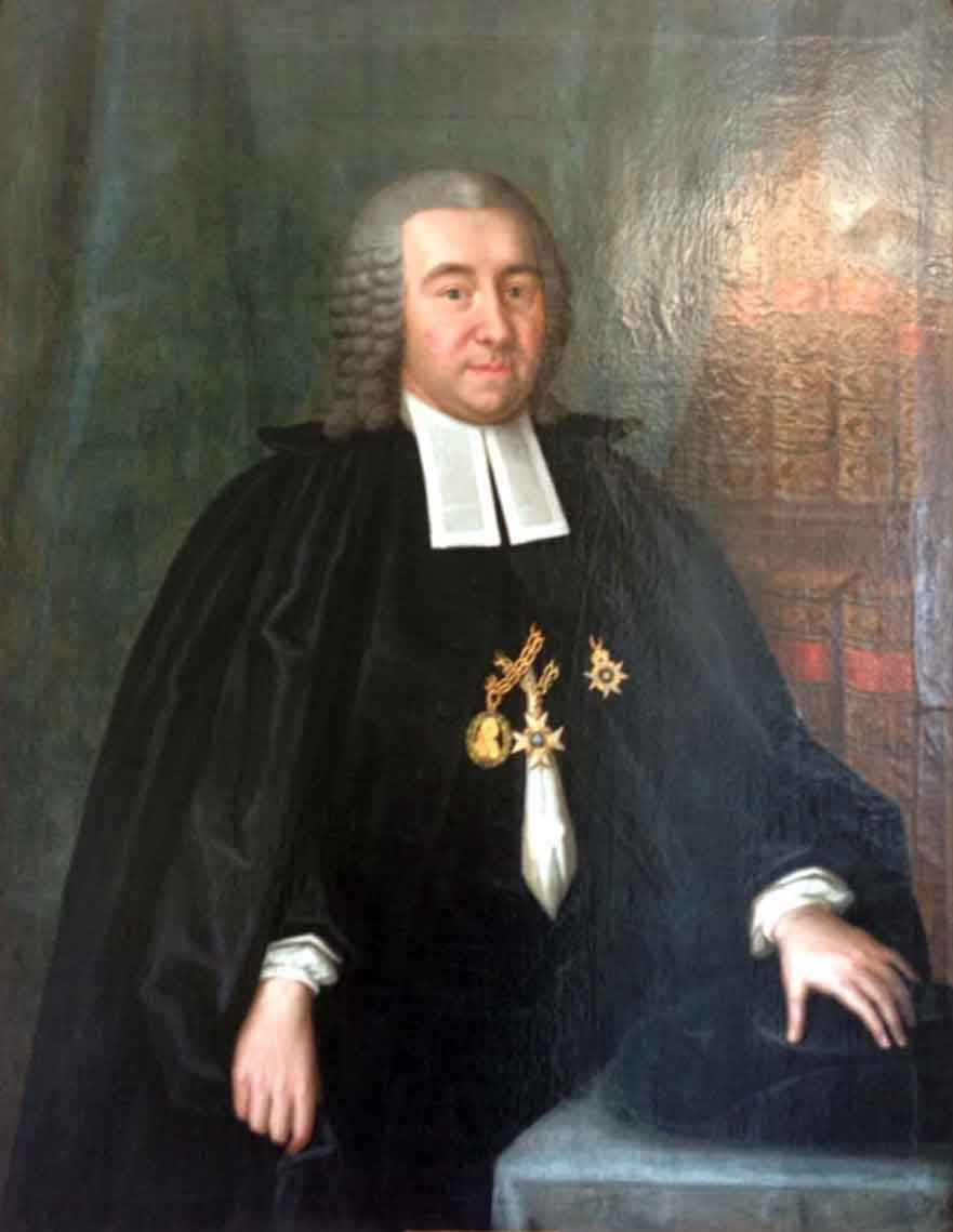 Biskop Gabriel Thimotheus Lütkemann, avporträtterad av okänd konstnär ca 1780